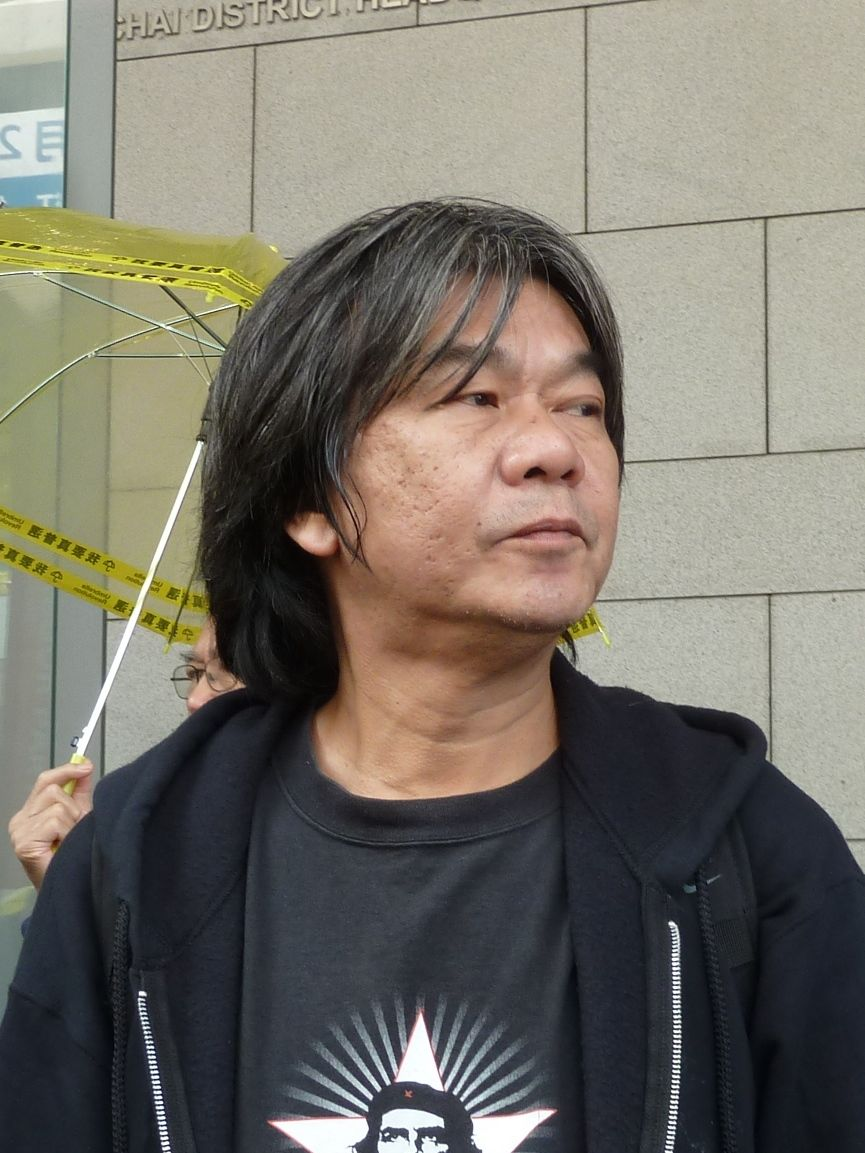 "Long Hair" Leung Kwok-hung in January 2015